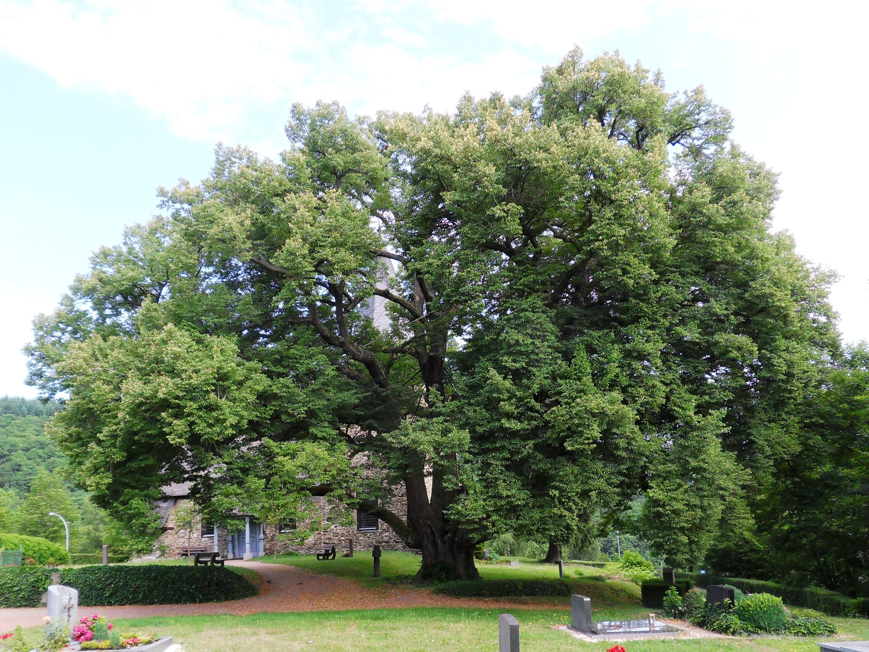 Die Apostellinde auf dem Friedhof der Alten Pfarrkirche in Michelbach, Blick von Süden